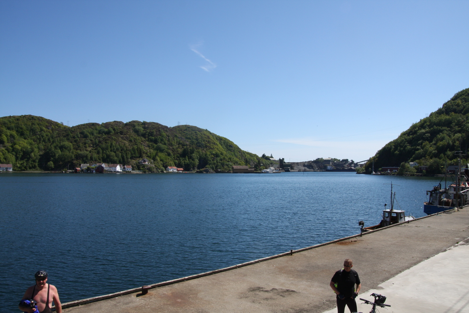 Rekefjord